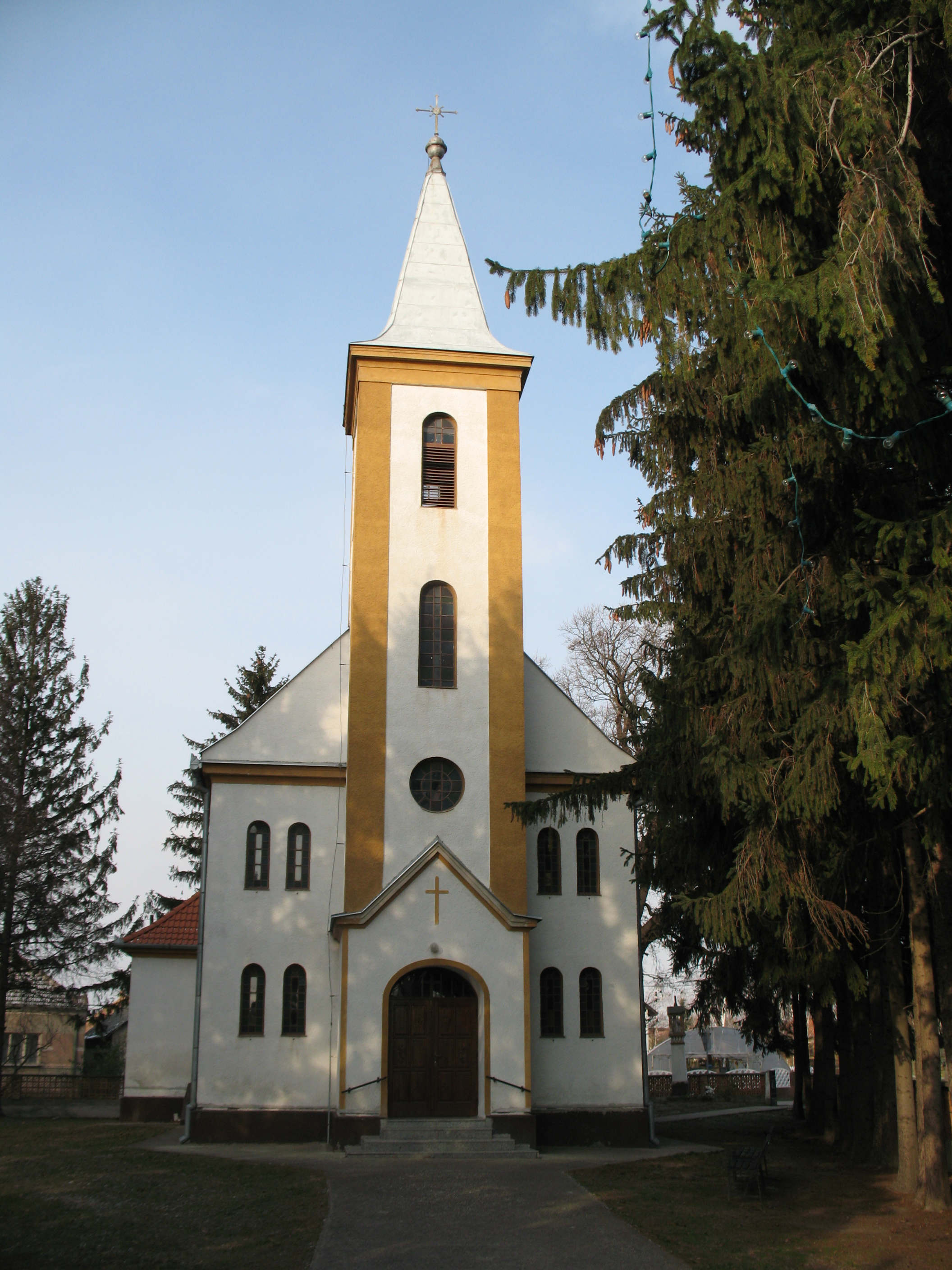 Nyárad